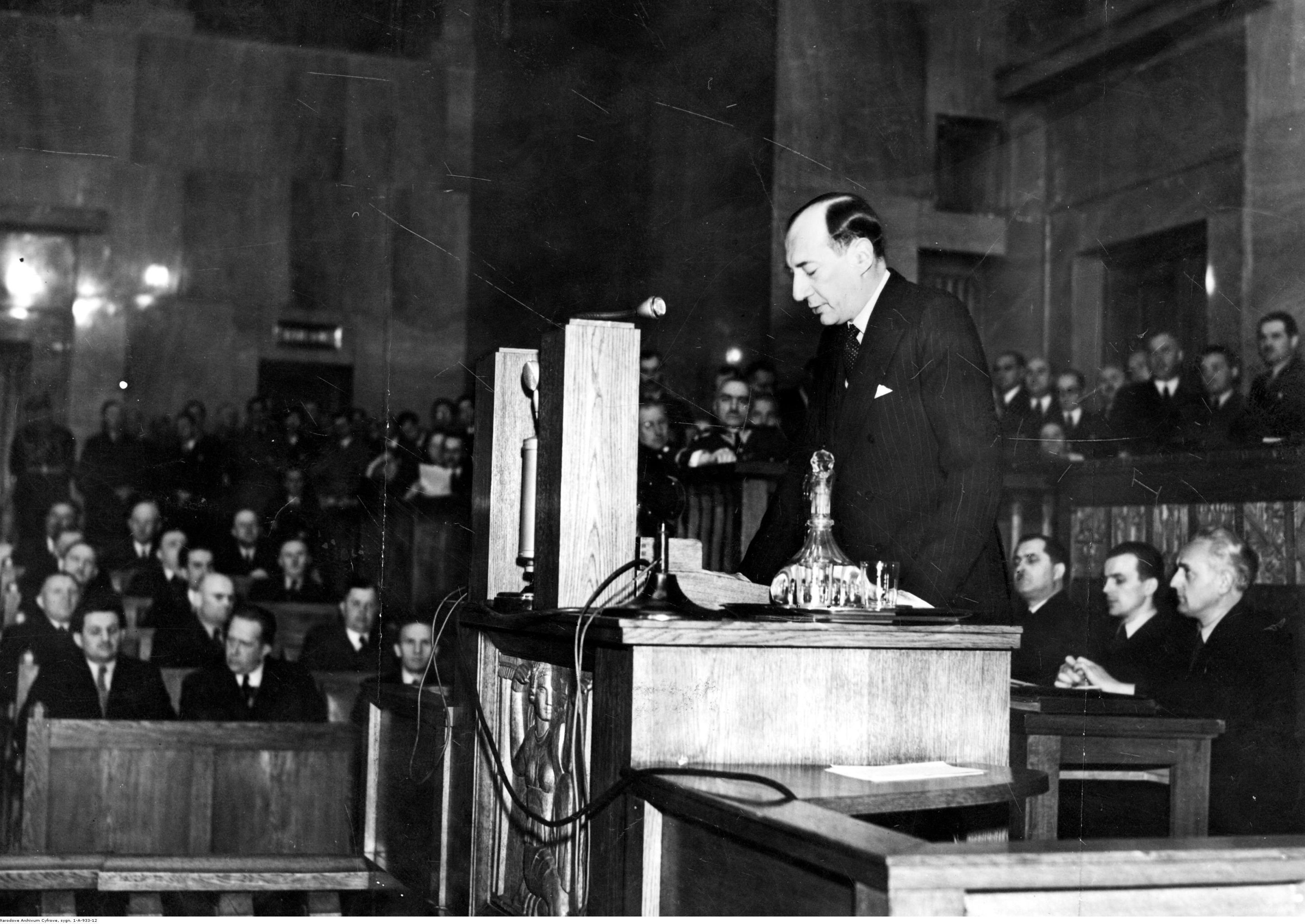 Przemówienie Becka z 5 maja 1939 r., zdjęcie z tygodnika Światowid.